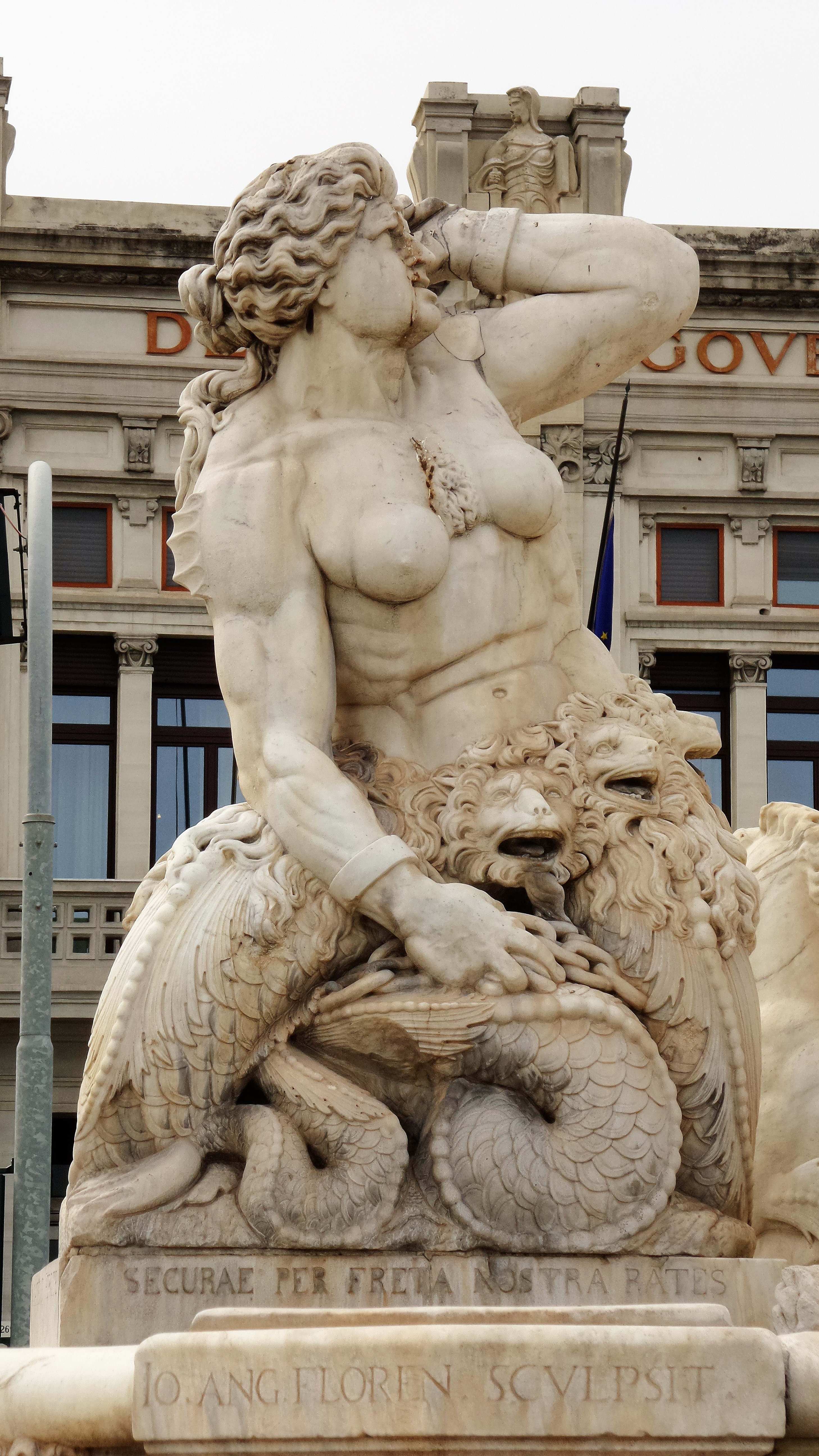 Neptunbrunnen (Messina), Scylla